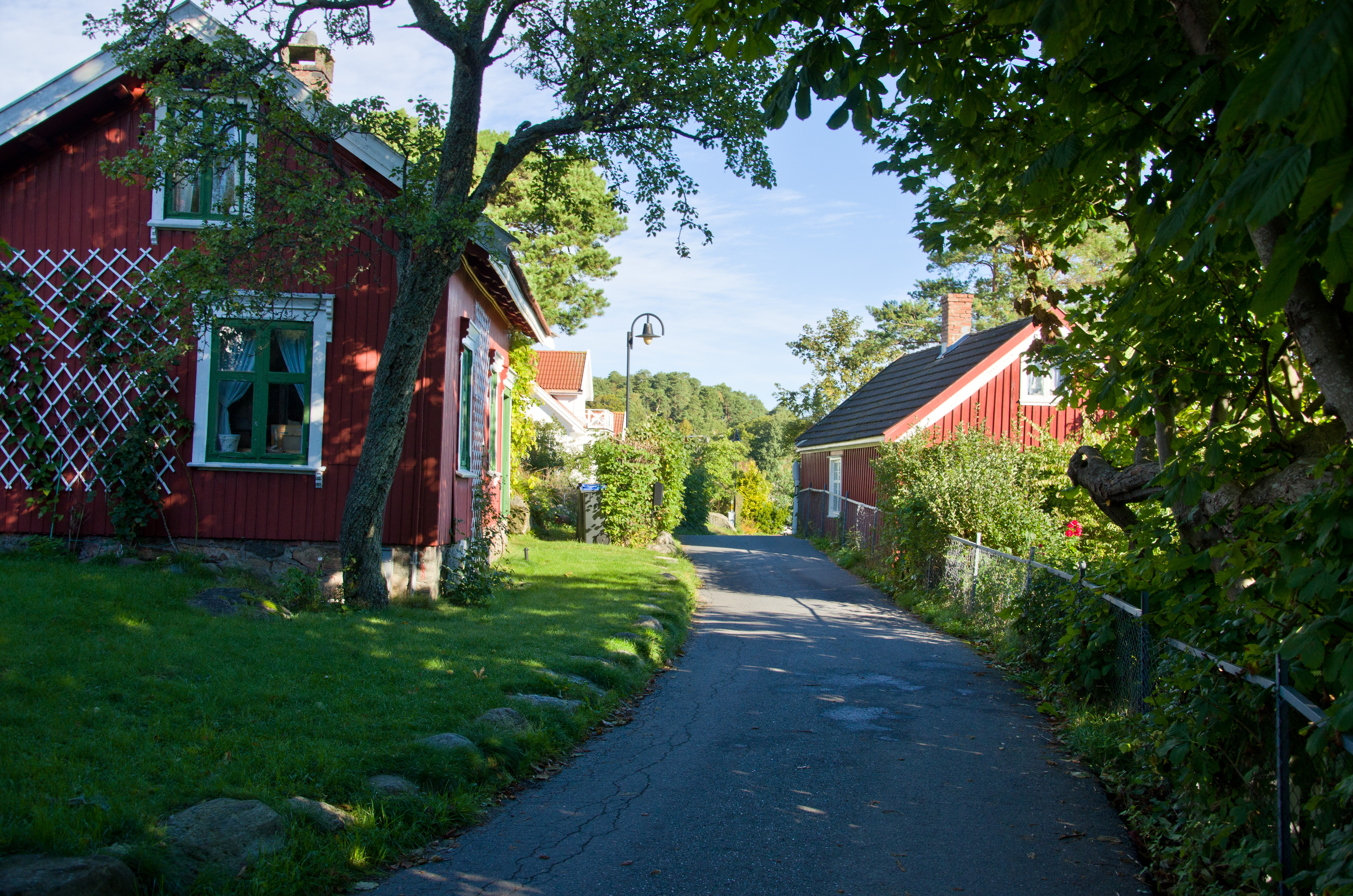 Natholmen, Sandefjord, Vestfold, Norge